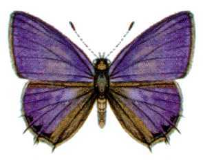 Anthene seltuttus affinis